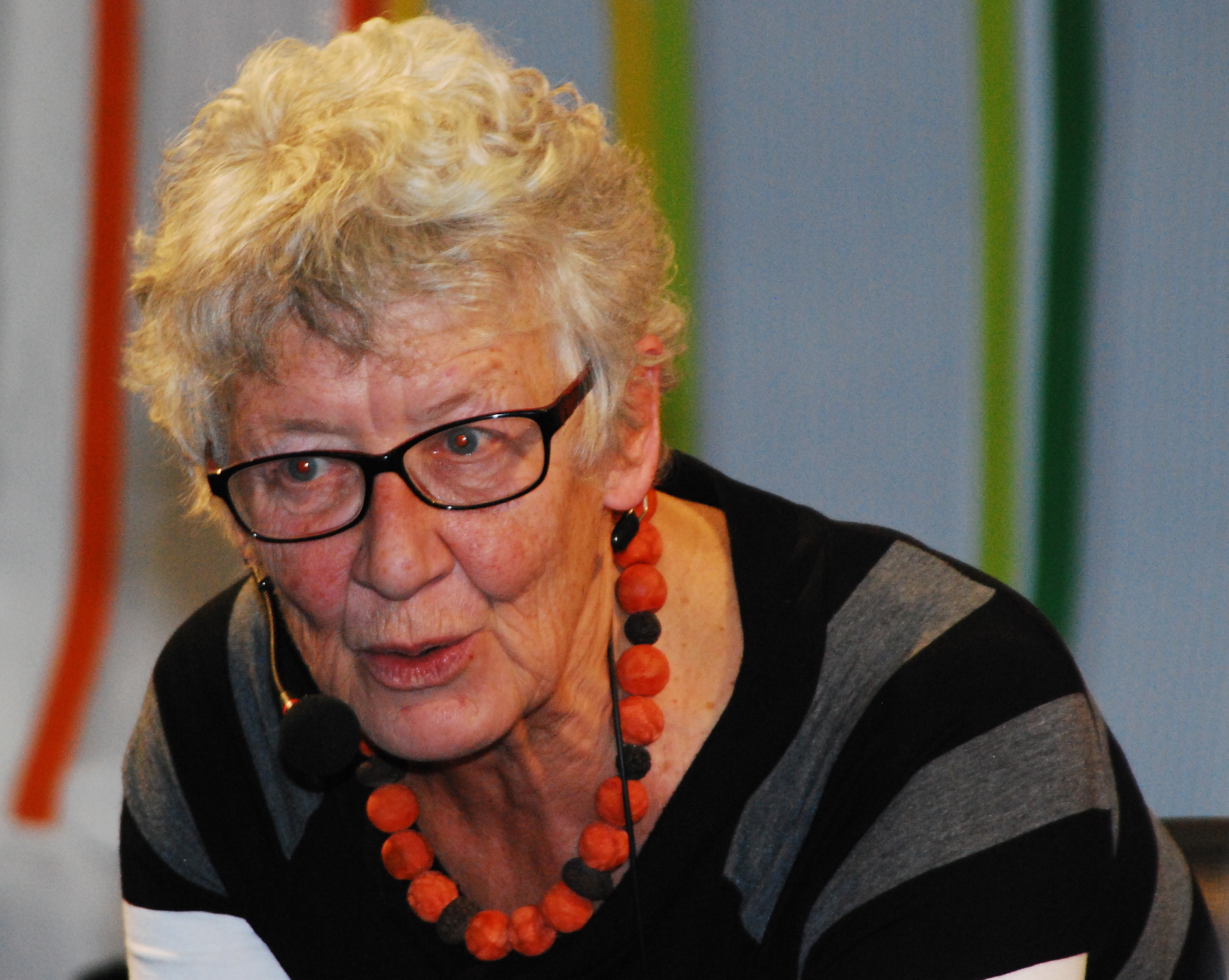 Jutta Treiber, fotografiert auf der Buchmesse Buch Wien 12 auf dem Wiener Messegelände